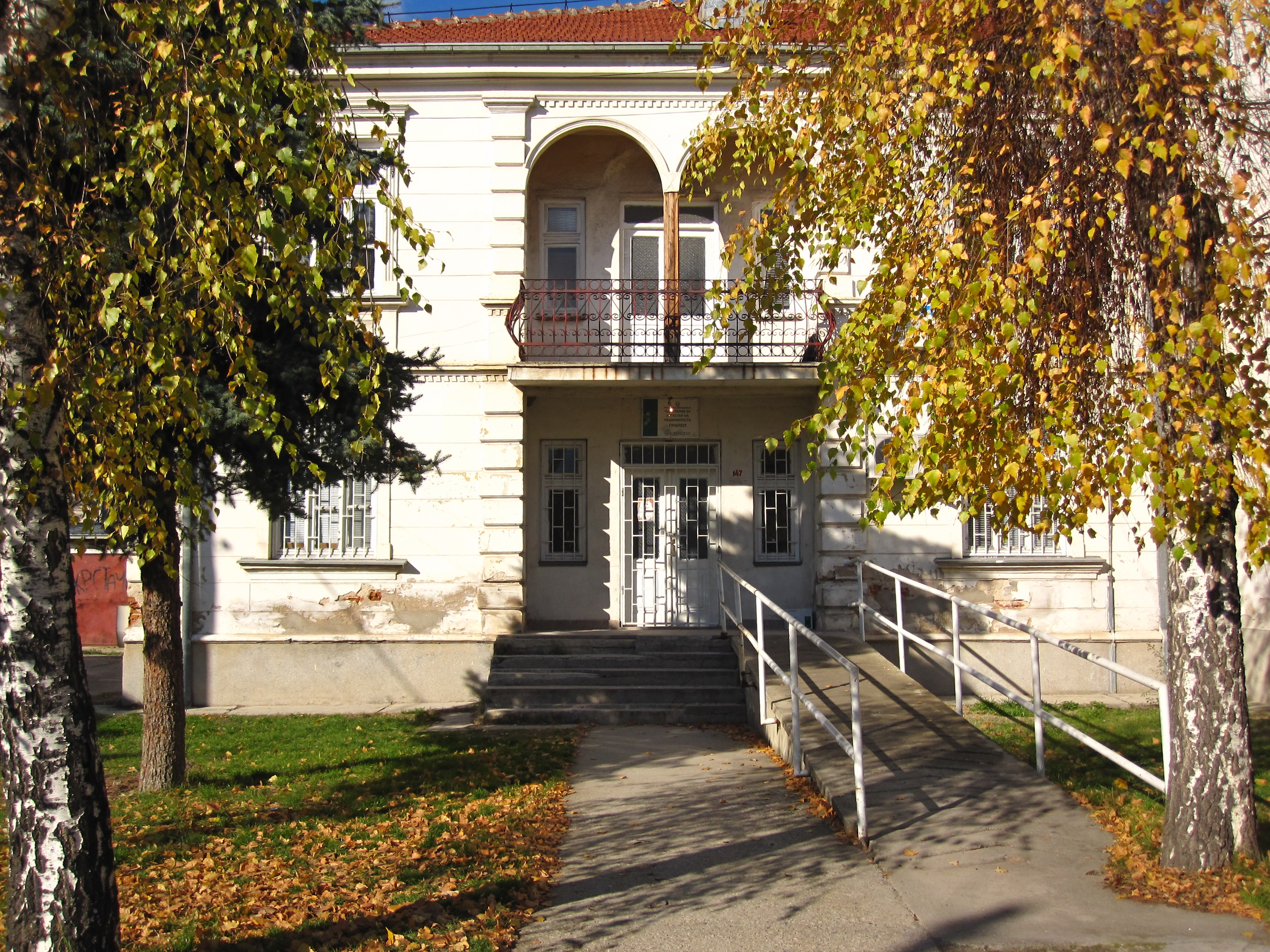 Катастар - Прилеп